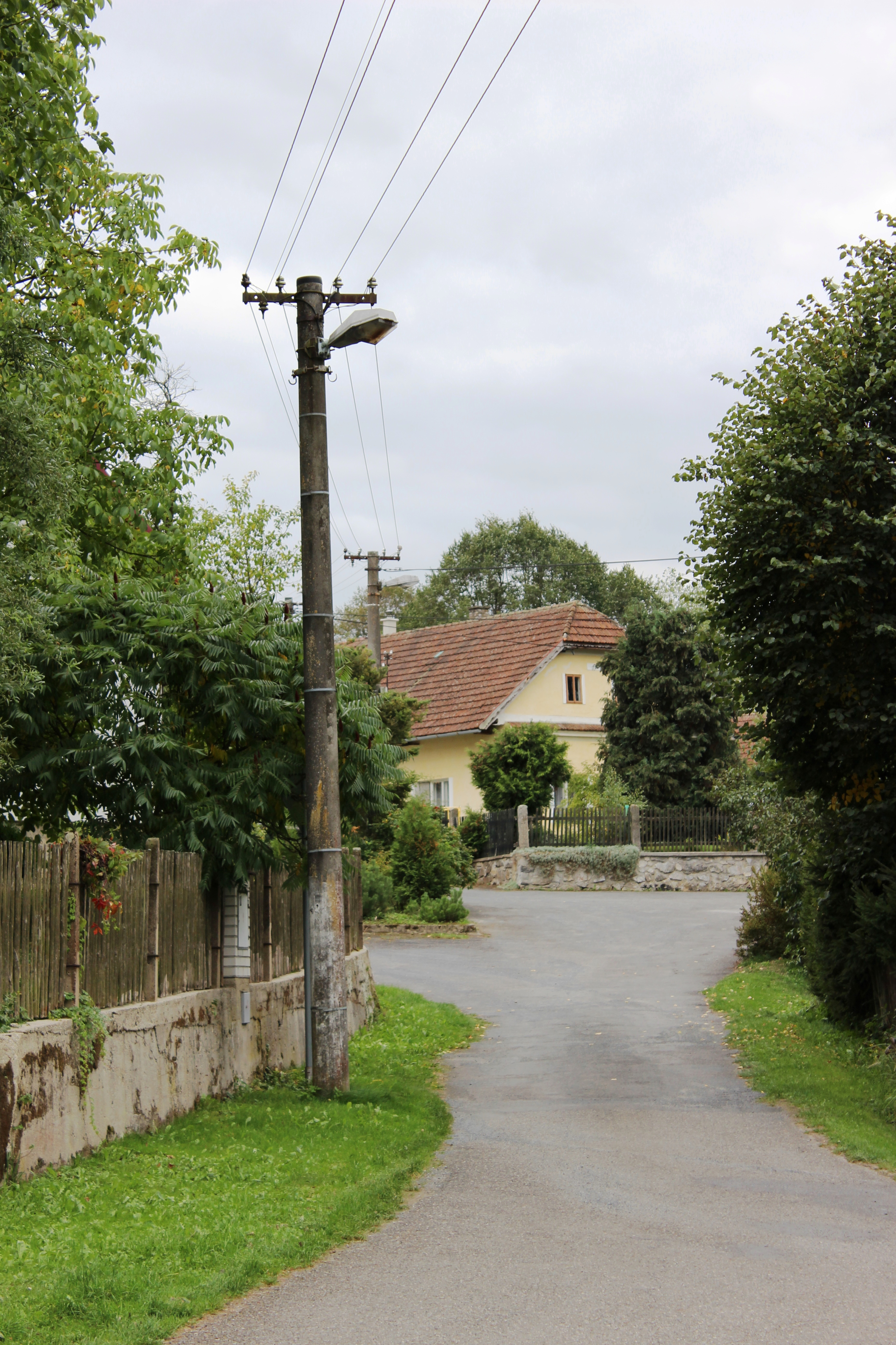 Třemešná (Jistebnice). Okres Tábor. Česká republika.